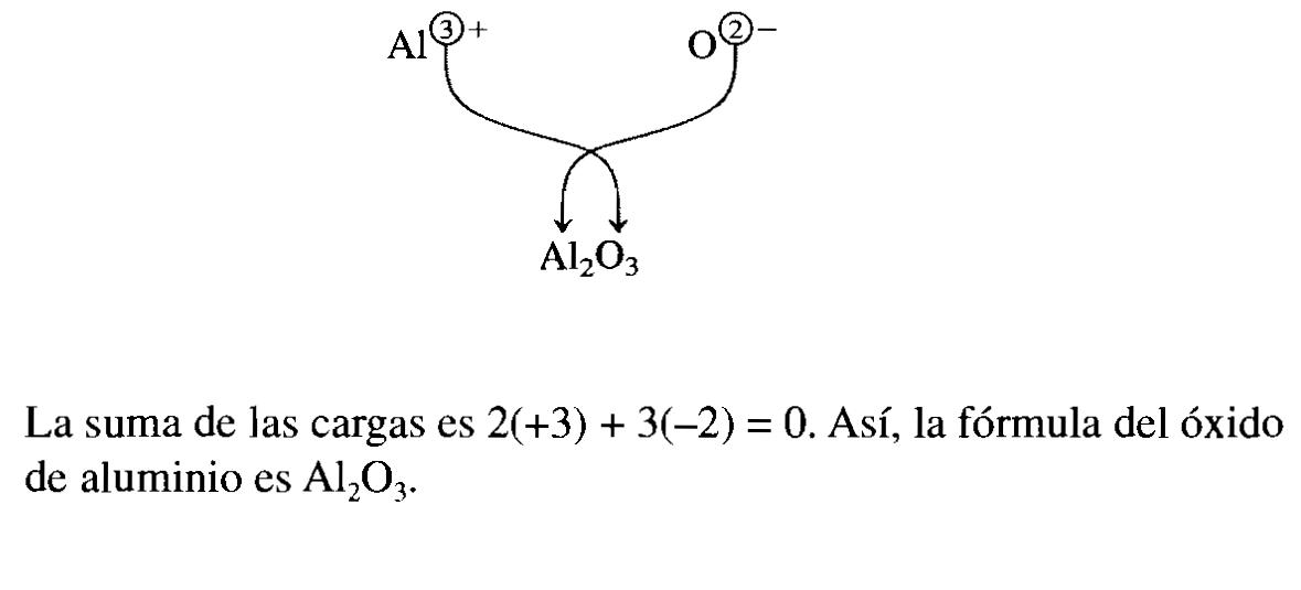 Extraido del "Chang Quimica General 7° Edicion"